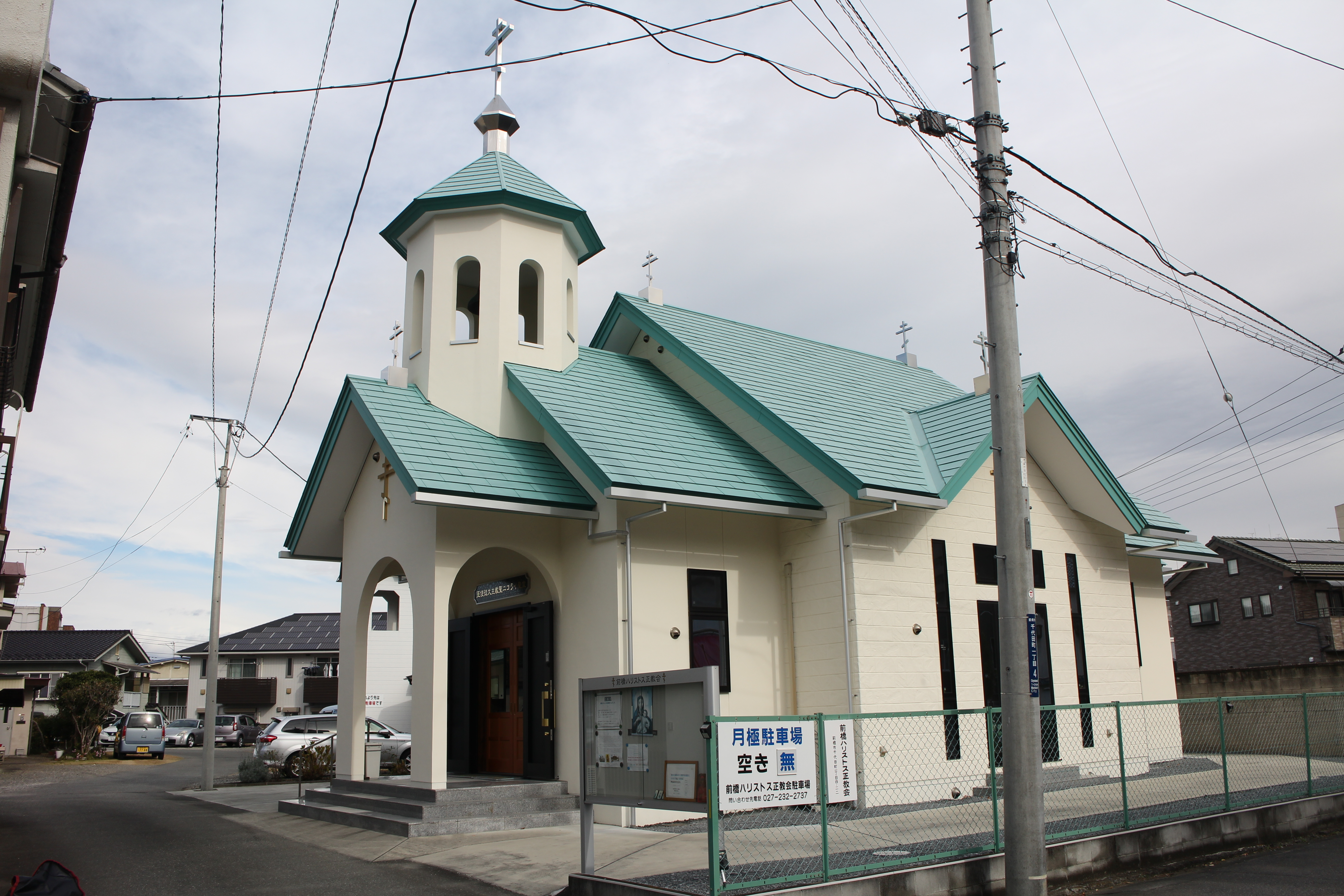 前橋ハリストス正教会。2019年11月28日撮影。